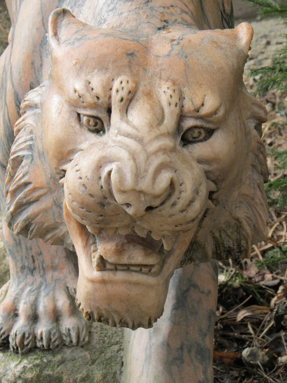 20120219 Olmense Zoo